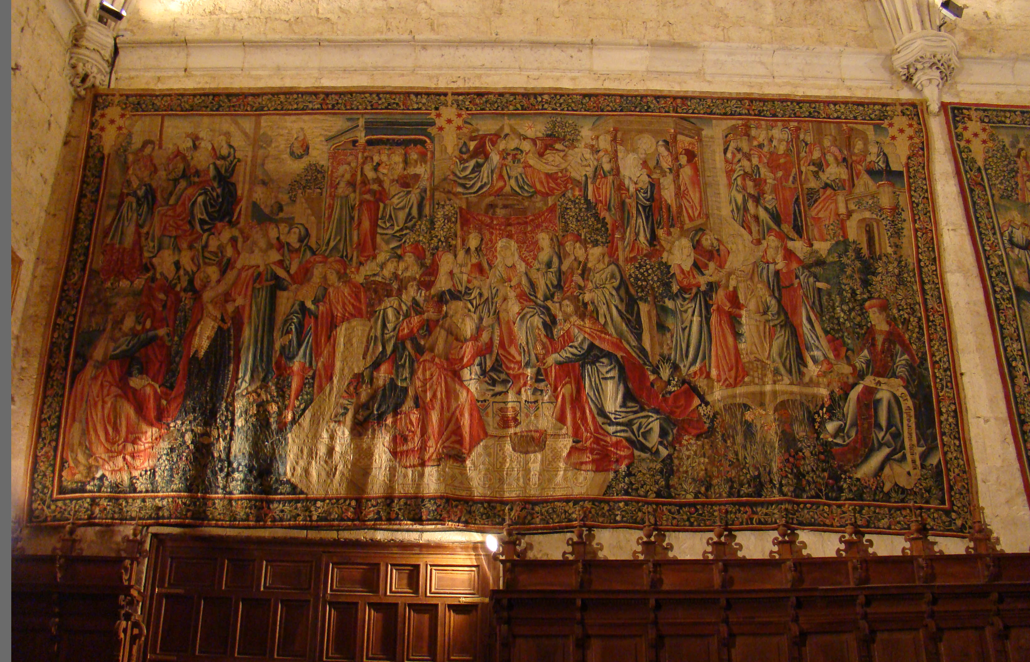 Ex Aegypto vocavi filivm mevm. Parte de una colección de tapices de la catedral de Palencia (España). Fueron adquiridos en los Talleres de Bruselas y en los de Marche-Crétif, que era el tapicero de Francisco I de Francia. on tres series bien diferenciadas que siguen ciclos narrativos distintos, cuyos donantes fueron el obispo Juan Rodríguez de Fonseca y el Dr. Arroyo, canónigo de Palencia y magistral de Valladolid. El tapiz se conserva en la Sala Capitular de la catedral de san Antolín de Palencia, provincia de Palencia, (España).